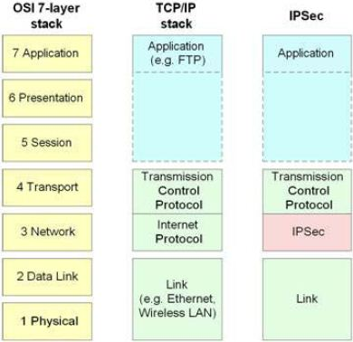 IPsec in de netwerklaag